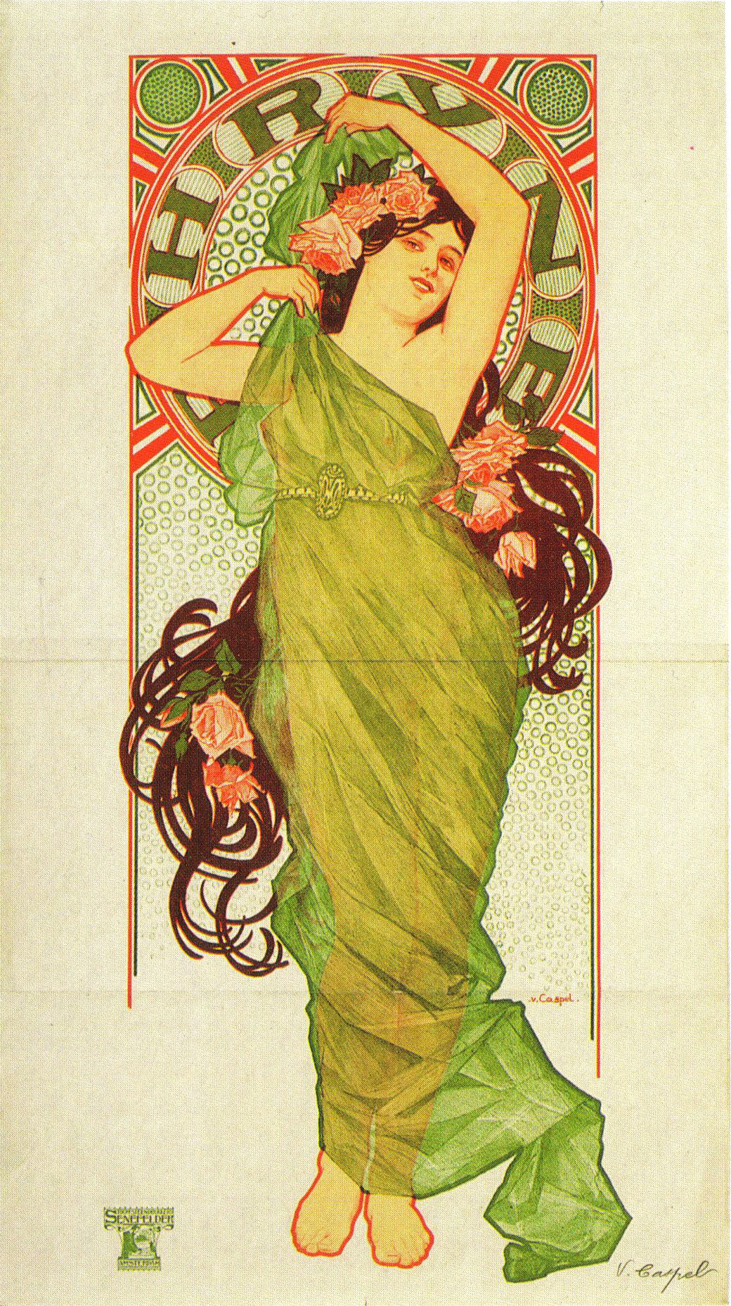 Affiche. "Phryne".